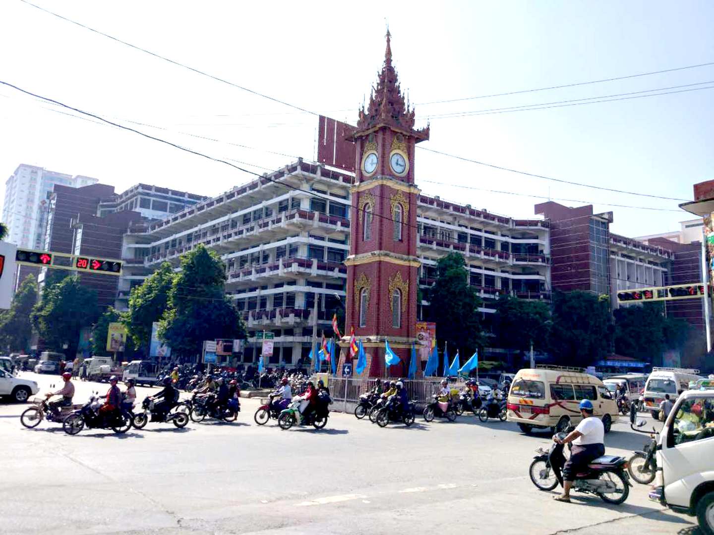 မြန်မာဘာသာ: ဈေးချို နာရီစင်(မန္တလေး)